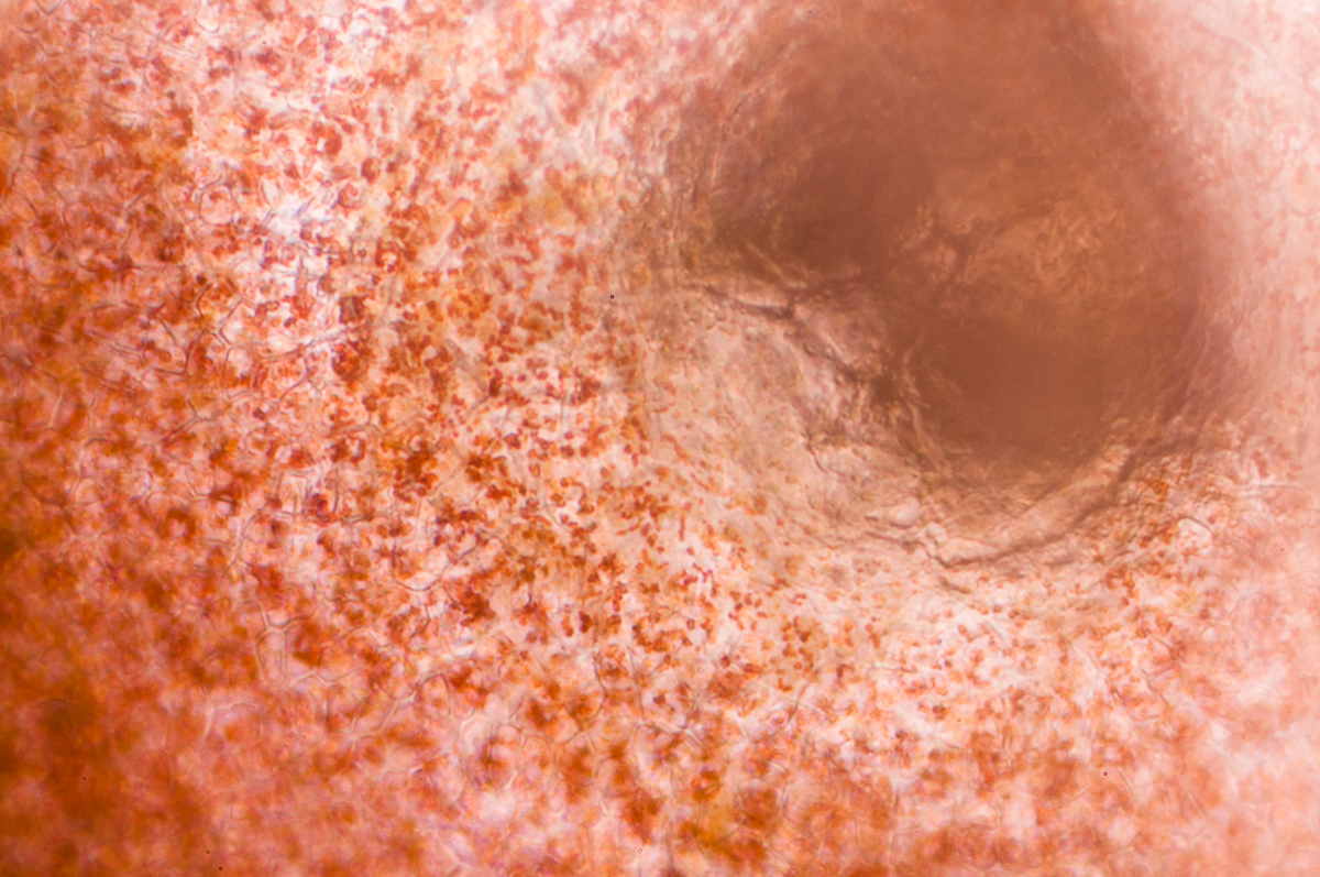 ...look like tunnels..! Chromoplasts are visible.